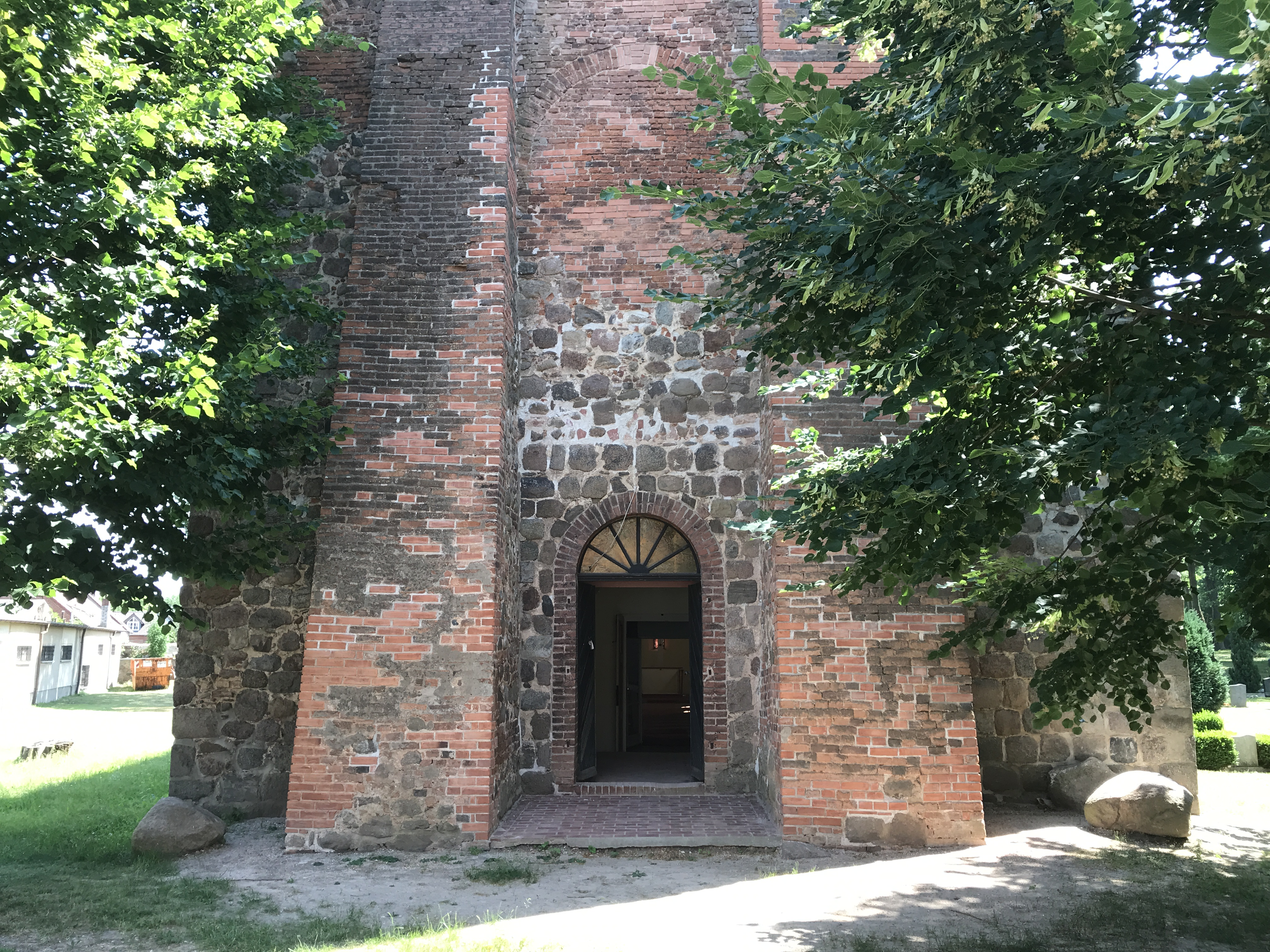 Die Dorfkirche Klosterdorf in Oberbarnim ist eine Feldsteinkirche aus der zweiten Hälfte des 13. Jahrhunderts im Landkreis Märkisch-Oderland im Land Brandenburg.